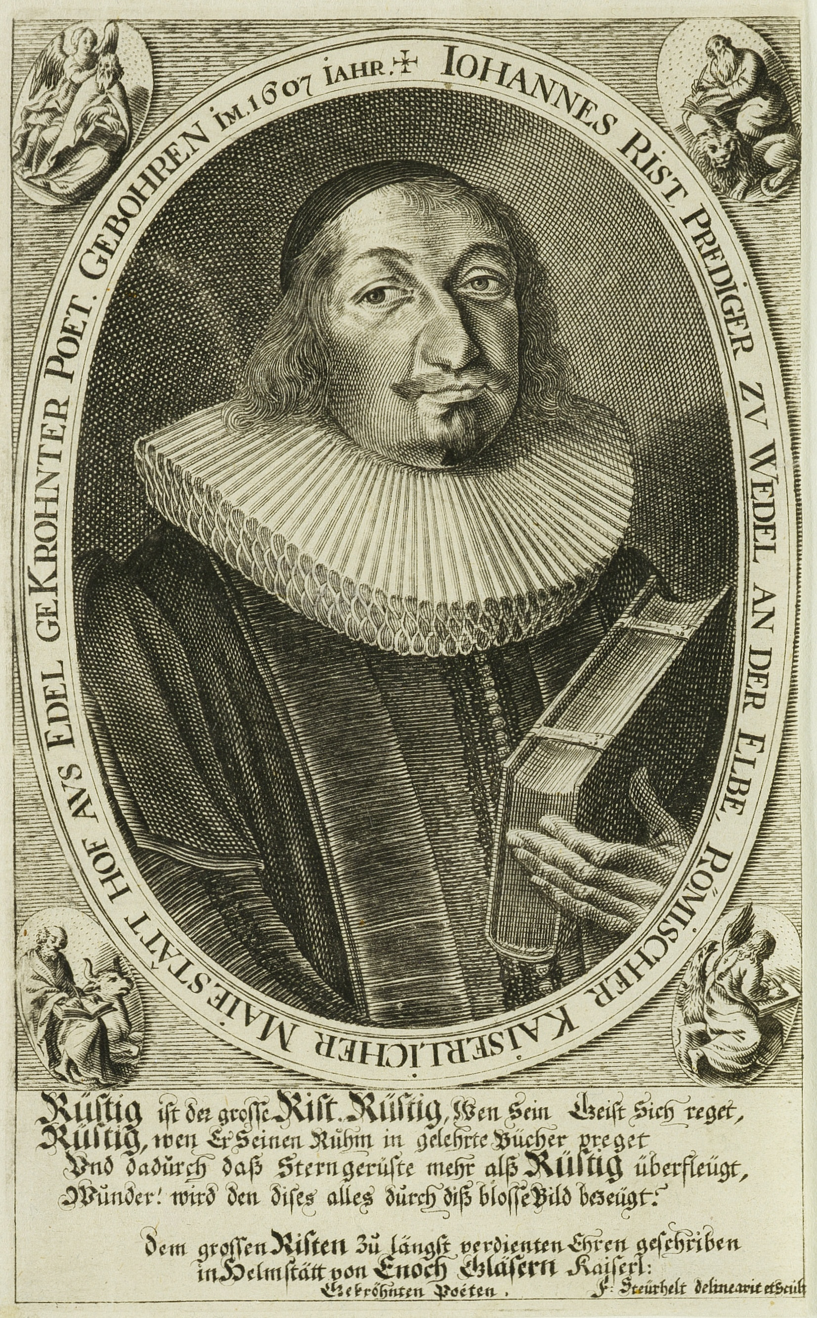 Bildnis von Johann Rist